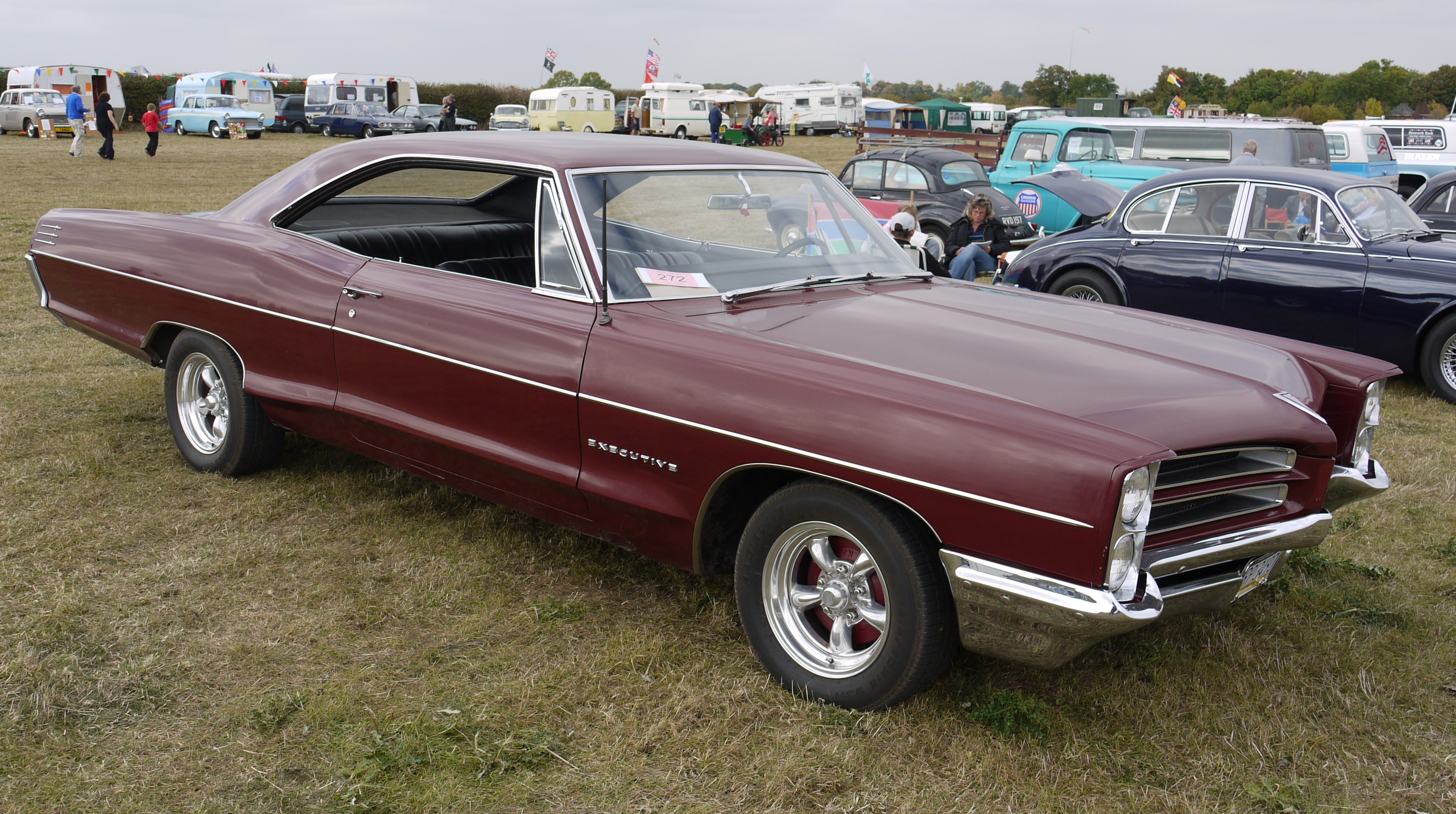 Panasonic G1